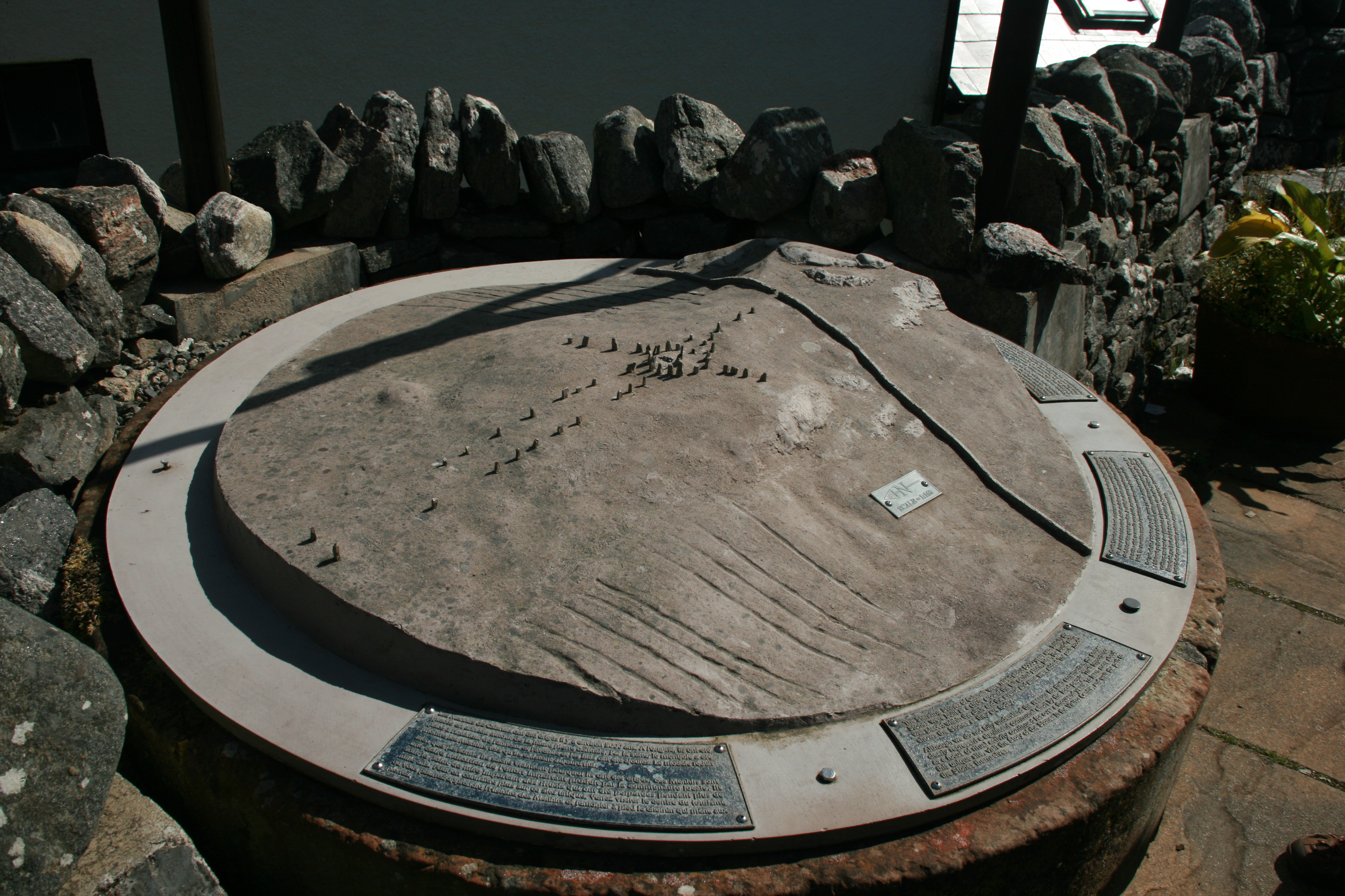 Piedras de Callanish en el verano de 2011. Erigidas en el Neolítico, están consideradas uno de los crómlech más importantes de Escocia. Se encuentran en las Hébridas Exteriores.